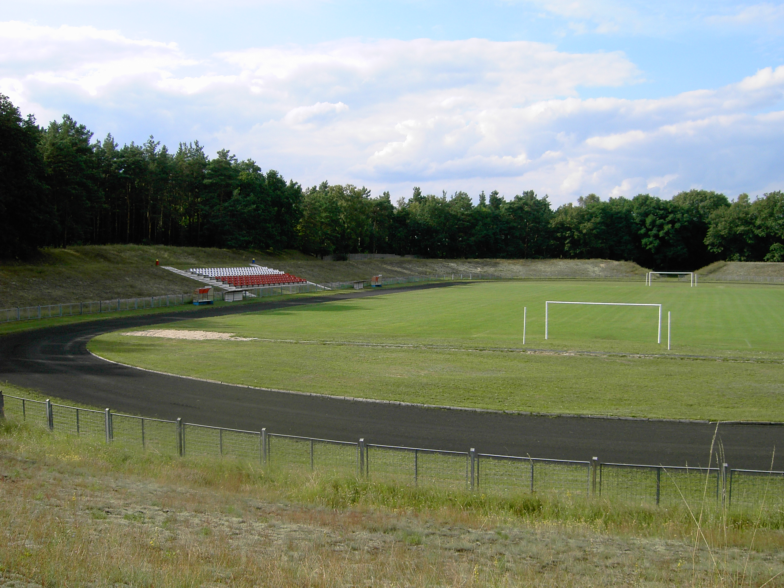 Stadion Miejski im. Janusza Kusocińskiego w Gubinie